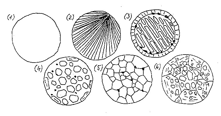 Kondrumok típusai a kondritos meteoritekben.